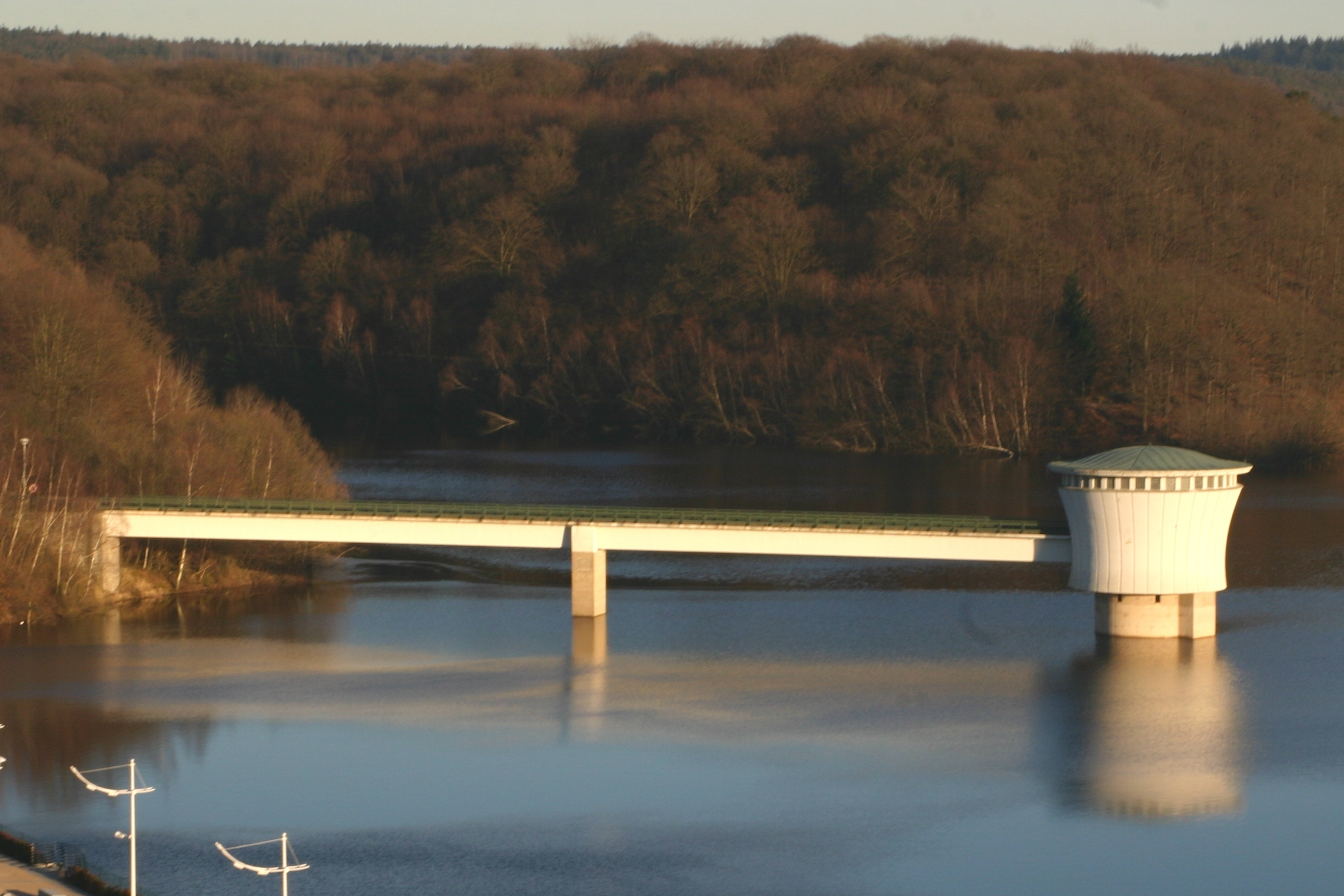 De rietse Wasserschacht vun der Gileppetalspär.